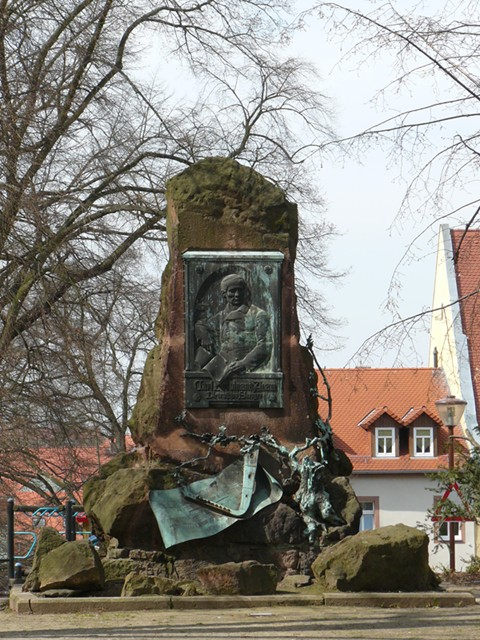 Das Denkmal wurde zu Ehren von Carl Ferdinand Adam errichtet.